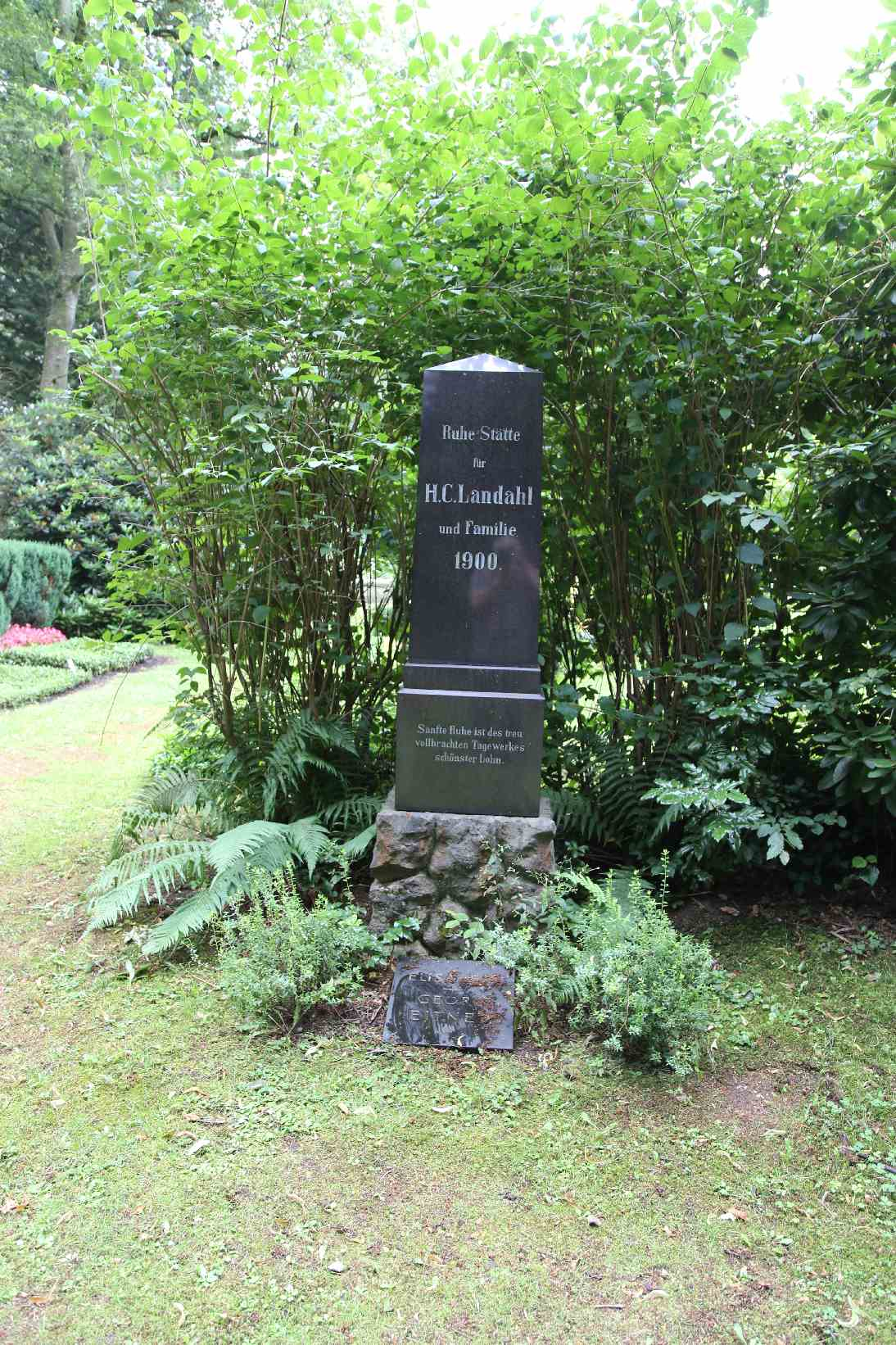 Heinrich Landahl (* 25. Januar 1895 in Altona; † 22. Oktober 1971 in Hamburg) war ein deutscher Politiker (DDP, SPD) und langjähriger Hamburger Schulsenator.